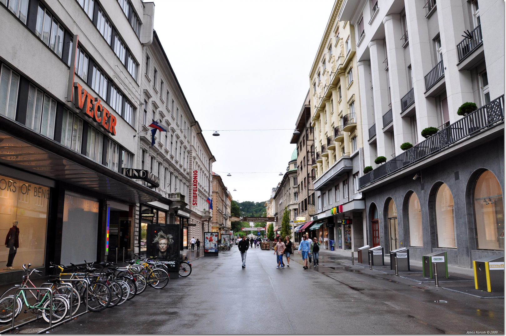 Ljubljana (67)